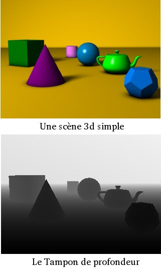 Fonctionnement du Z-Buffer